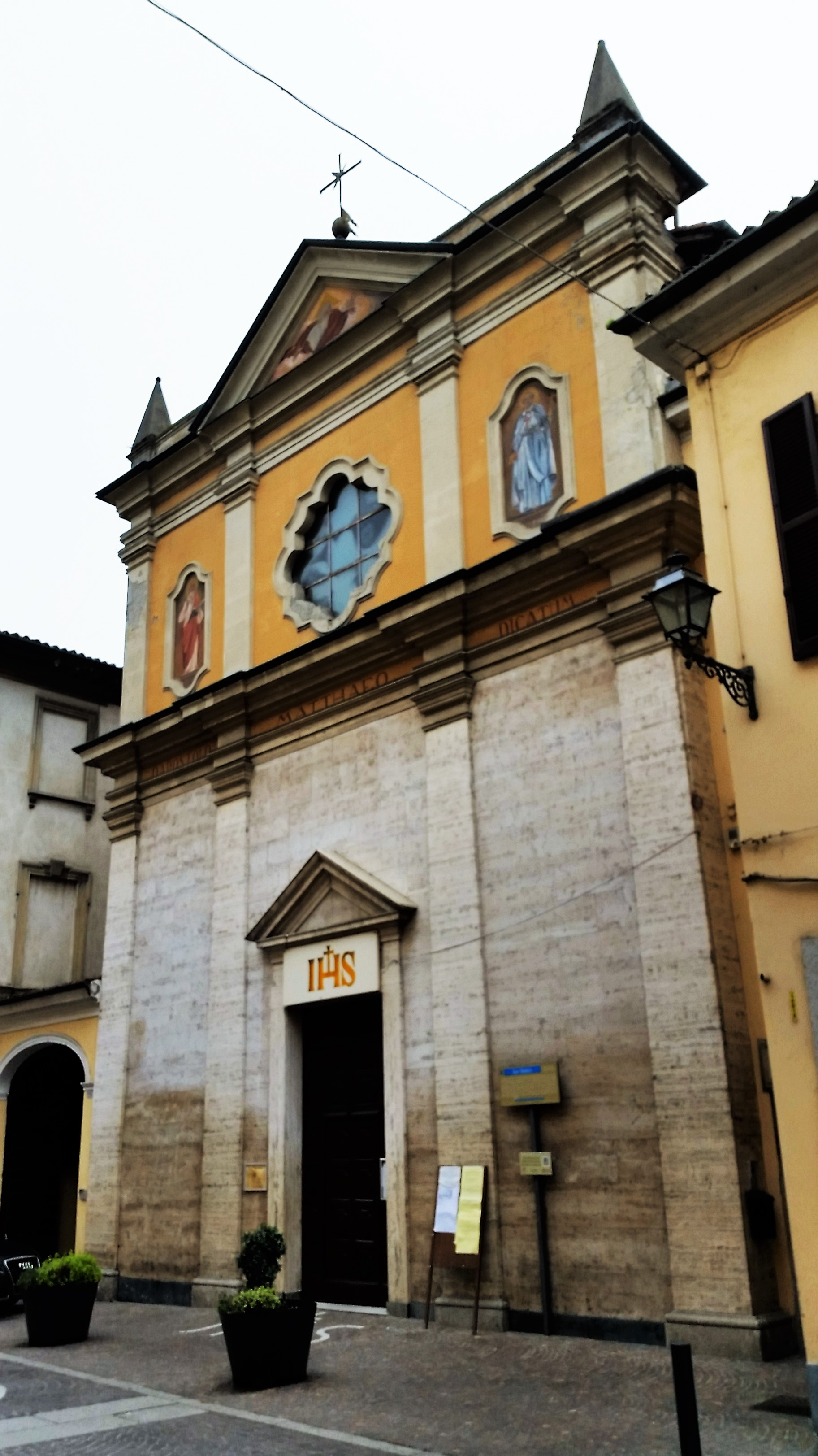 Facciata della Chiesa di San Matteo, Tortona, Italia. Fine XVII secolo, ricostruzione ad opera dei Domenicani. Restaurata nel 1961. All'interno una tavola di Barnaba da Modena (Maddona col Bambino, XIII secolo). La canonica comprende una costruzione a pianta quadrata (8.90 x 8.70m), databile al I secolo, tradizionalmente indicata come Mausoleo dell'imperatore Maiorano.